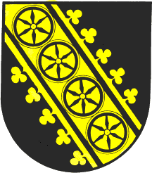 Wappen der ehemaligen Gemeinde Raaba, Steiermark, Österreich